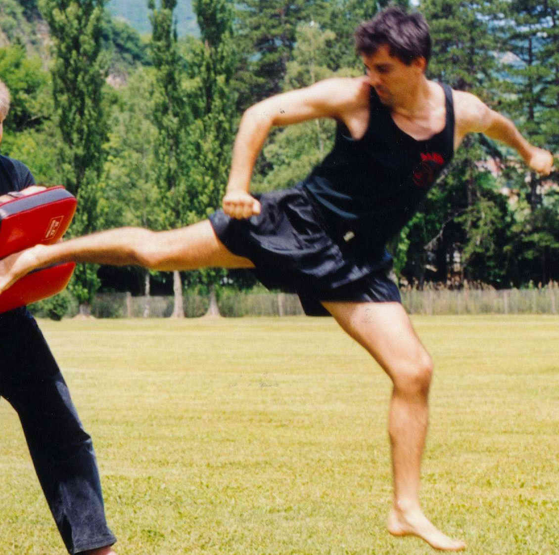 JRC-side.jpg